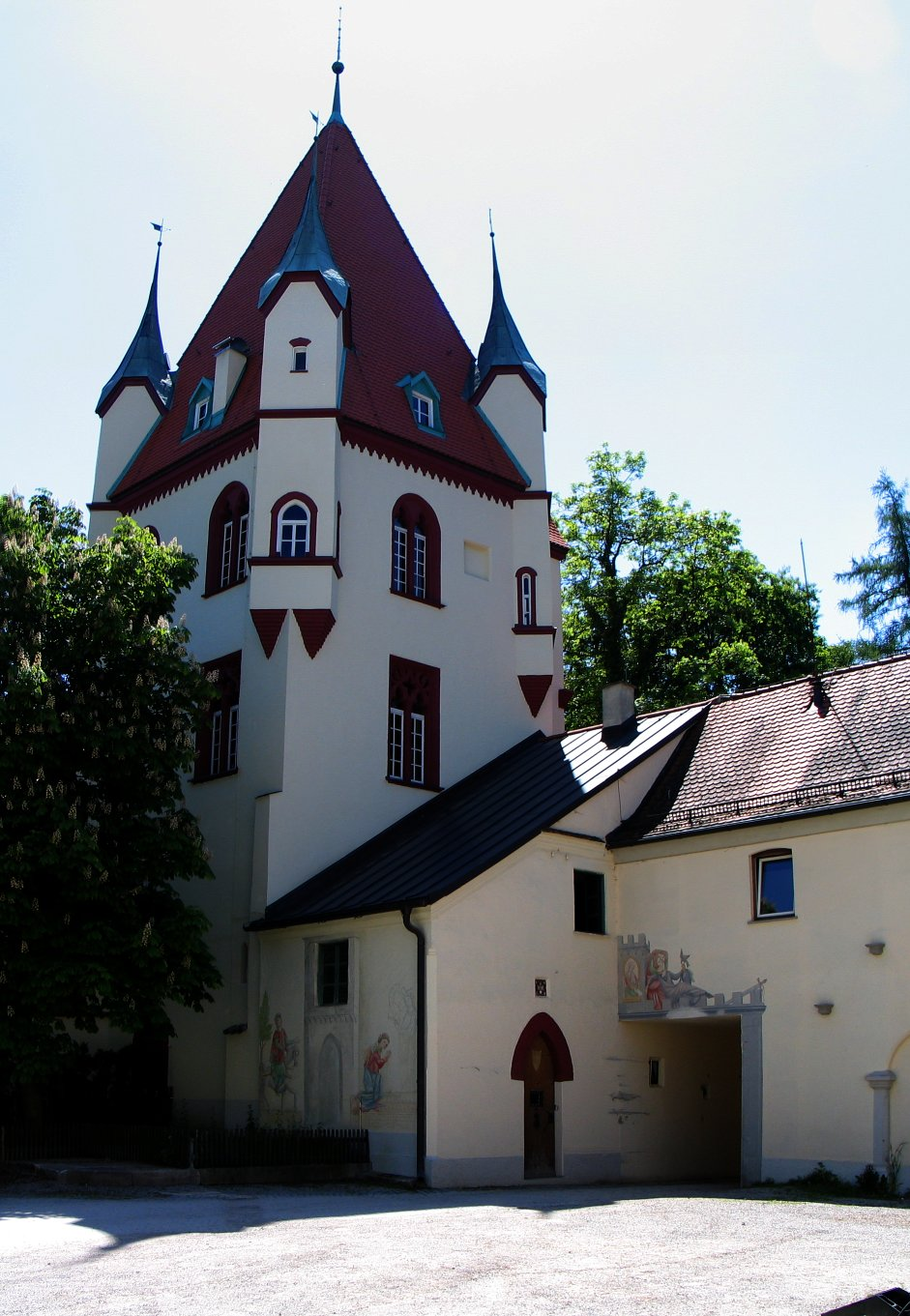 Schloss Kaltenberg Mai 2005 Quelle: selbst fotografiert Fotograf / Zeichner: Patrick Huebgen Upload : Pahu